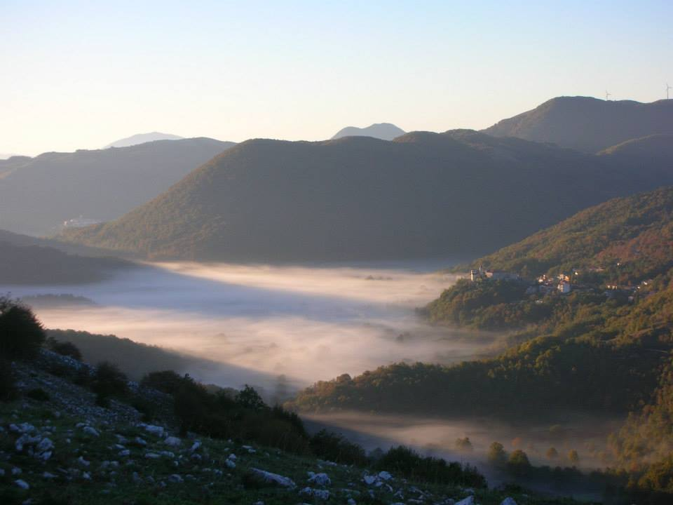 Brume mattutine che si levano dal lago prosciugato di Acquafondata